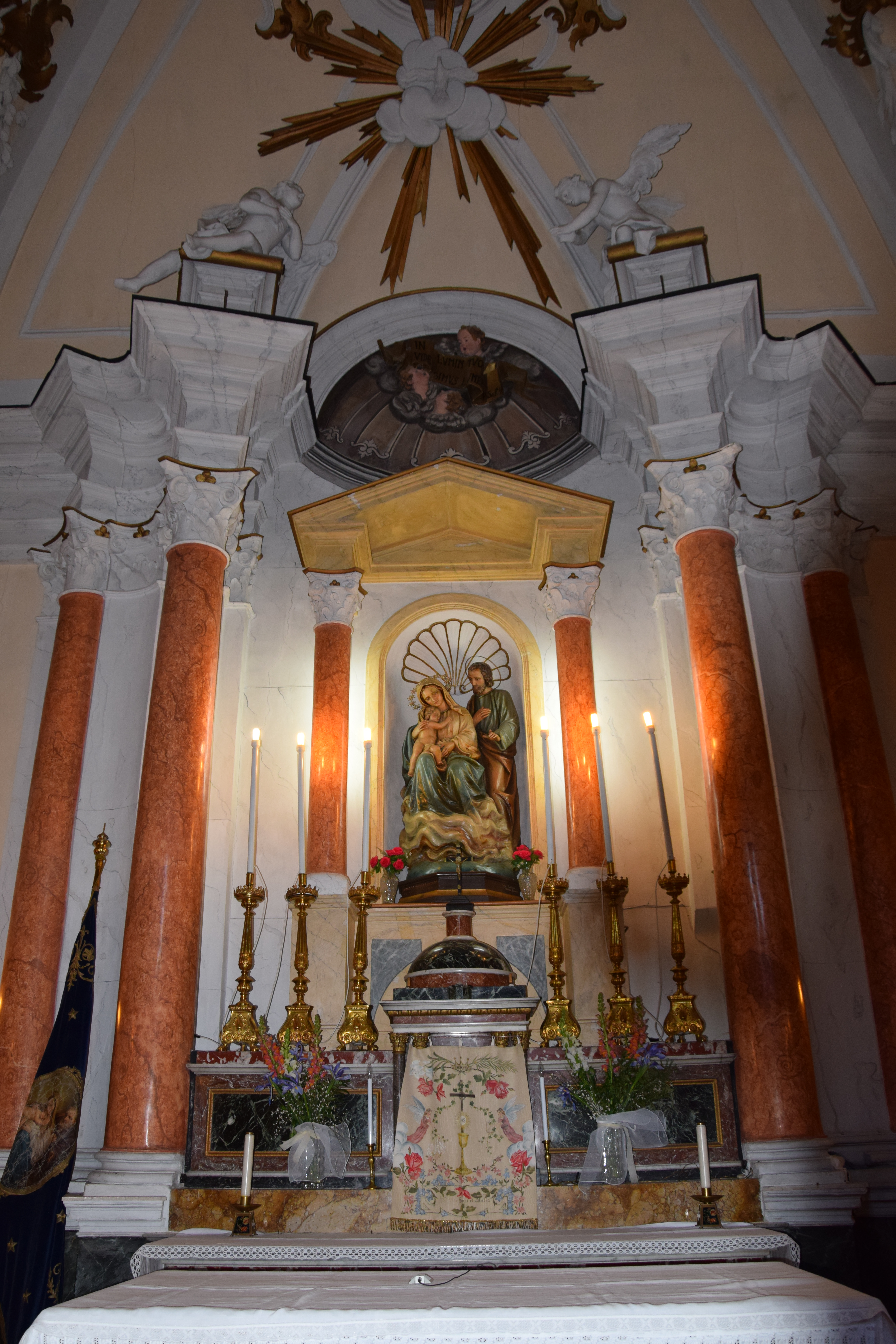 Chiesa della Sacra Famiglia (Alcamo)